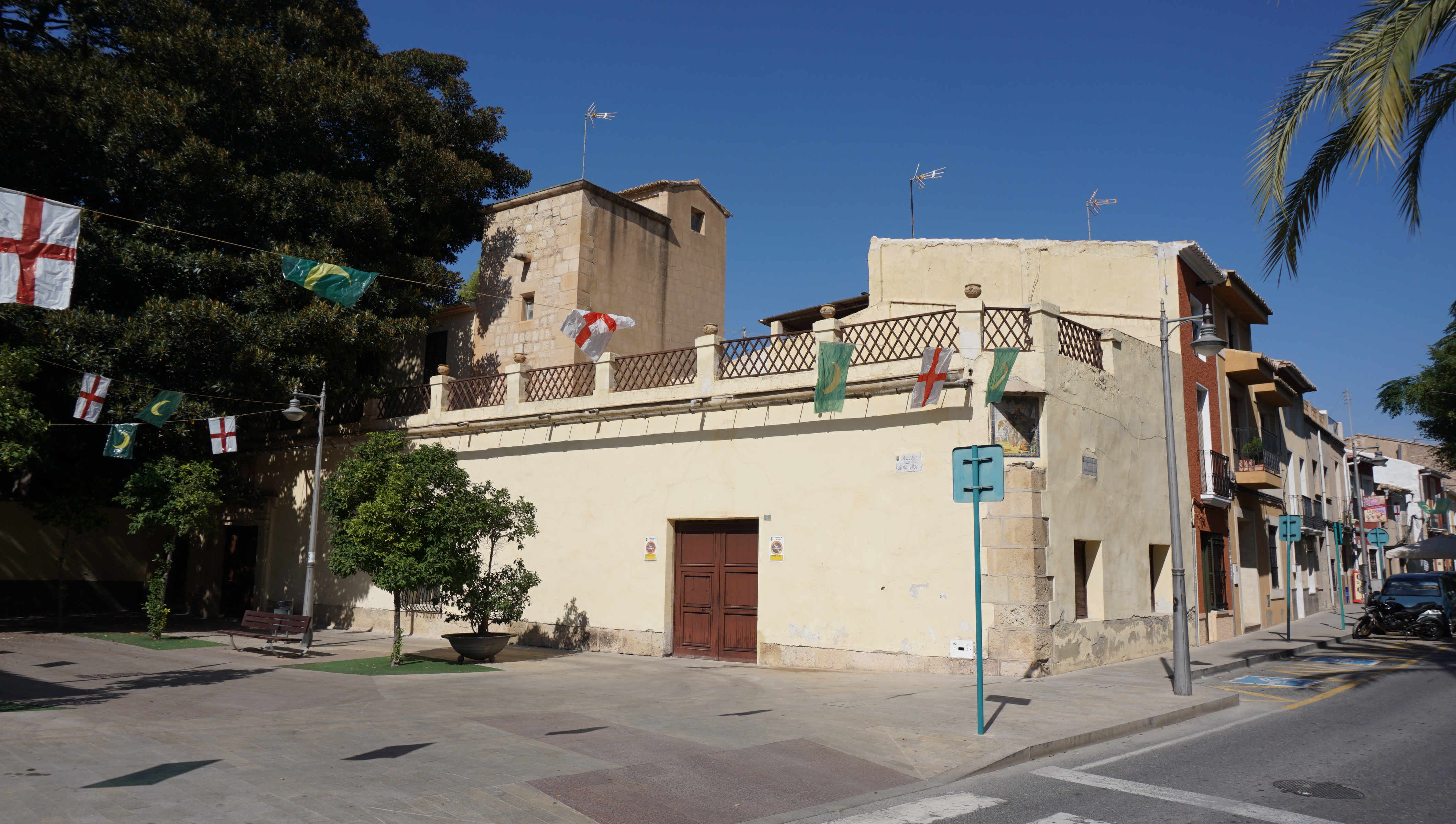 Se puede observar en el centro derecha la Torre Ferraz, a su izquierda se ve el ficus que asoma del Jardín de la Finca Casa de Ferraz. Se distingue el cruce entre el Paseo de la Constitución y la plaza San Roque.